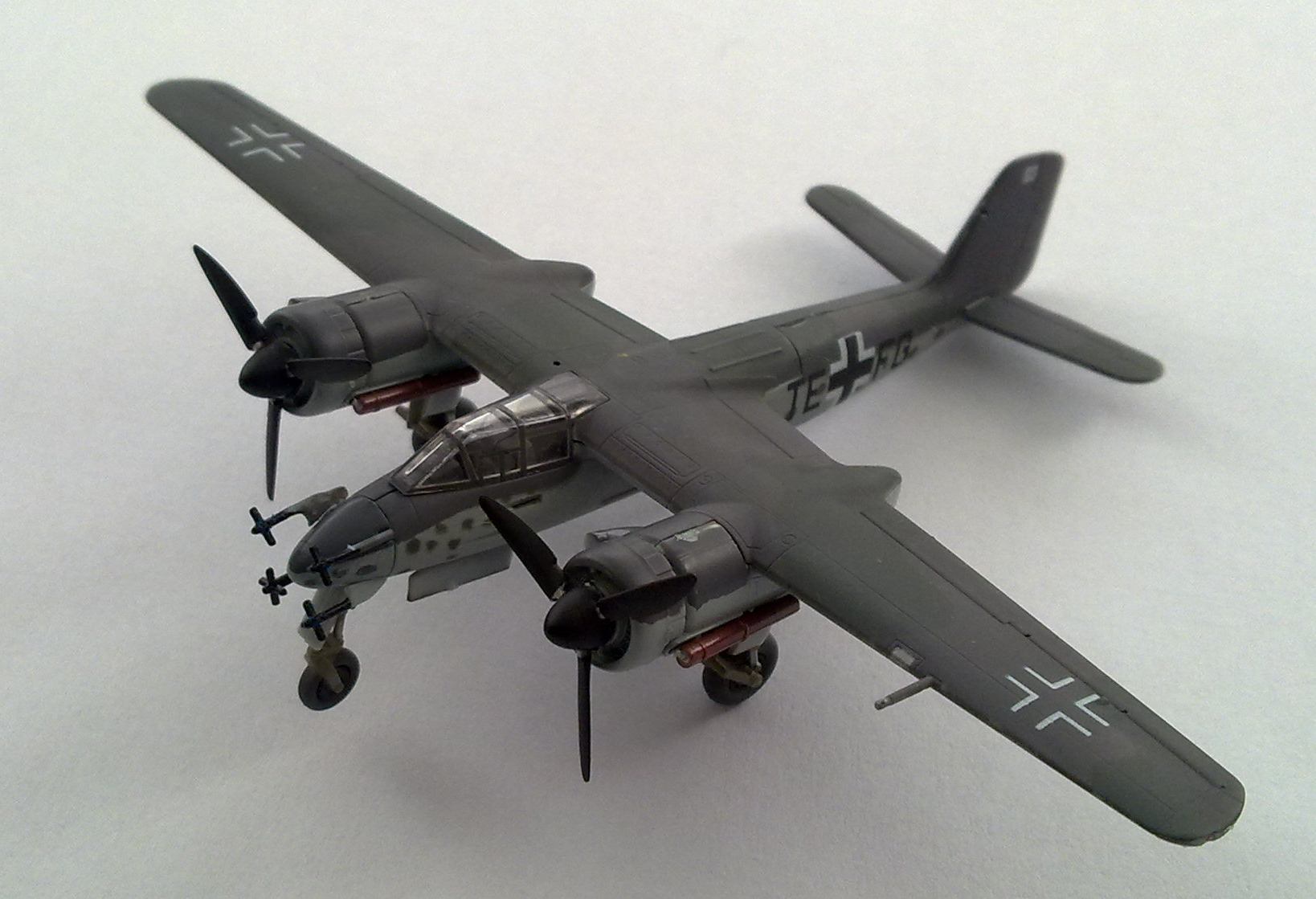 Seitenprofil Focke-Wulf Ta 154